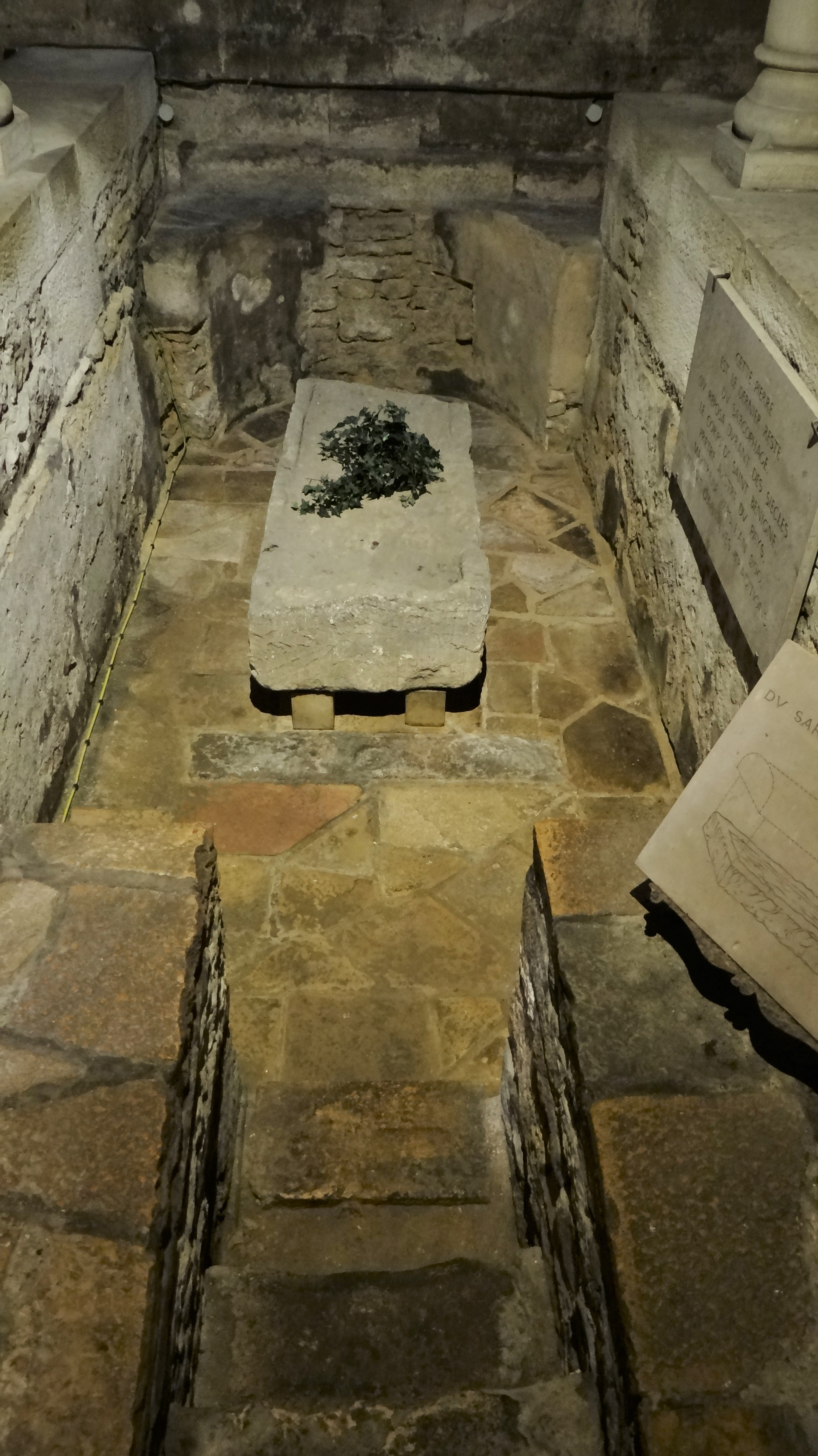 Tombeau de Saint Bénigne dans la crypte de la cathédrale éponyme de Dijon .